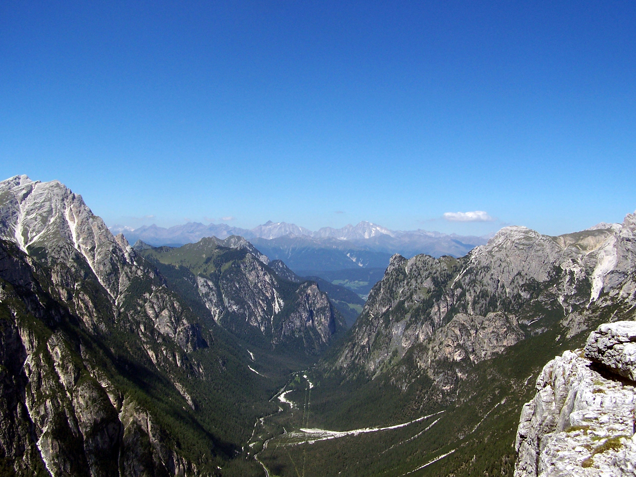 Blick ins Höhlensteintal vom Monte Piano aus